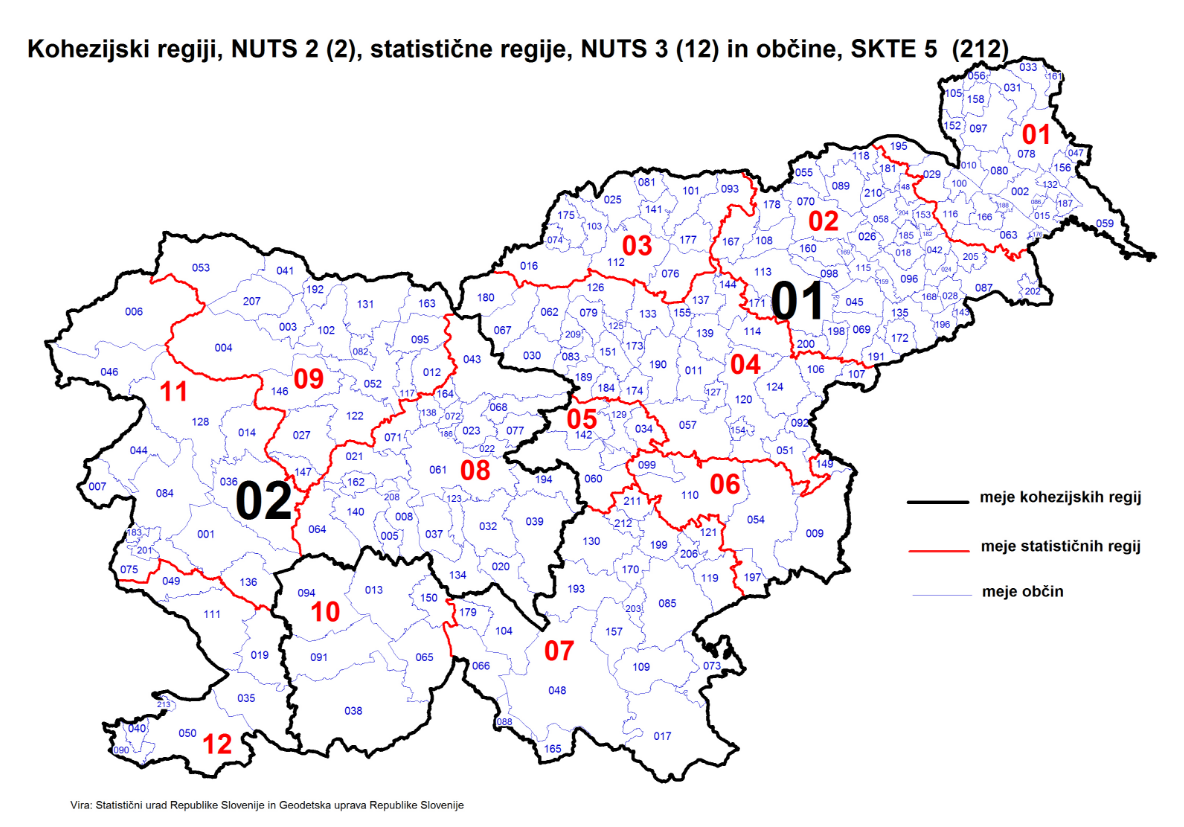 NUTS Slovenija